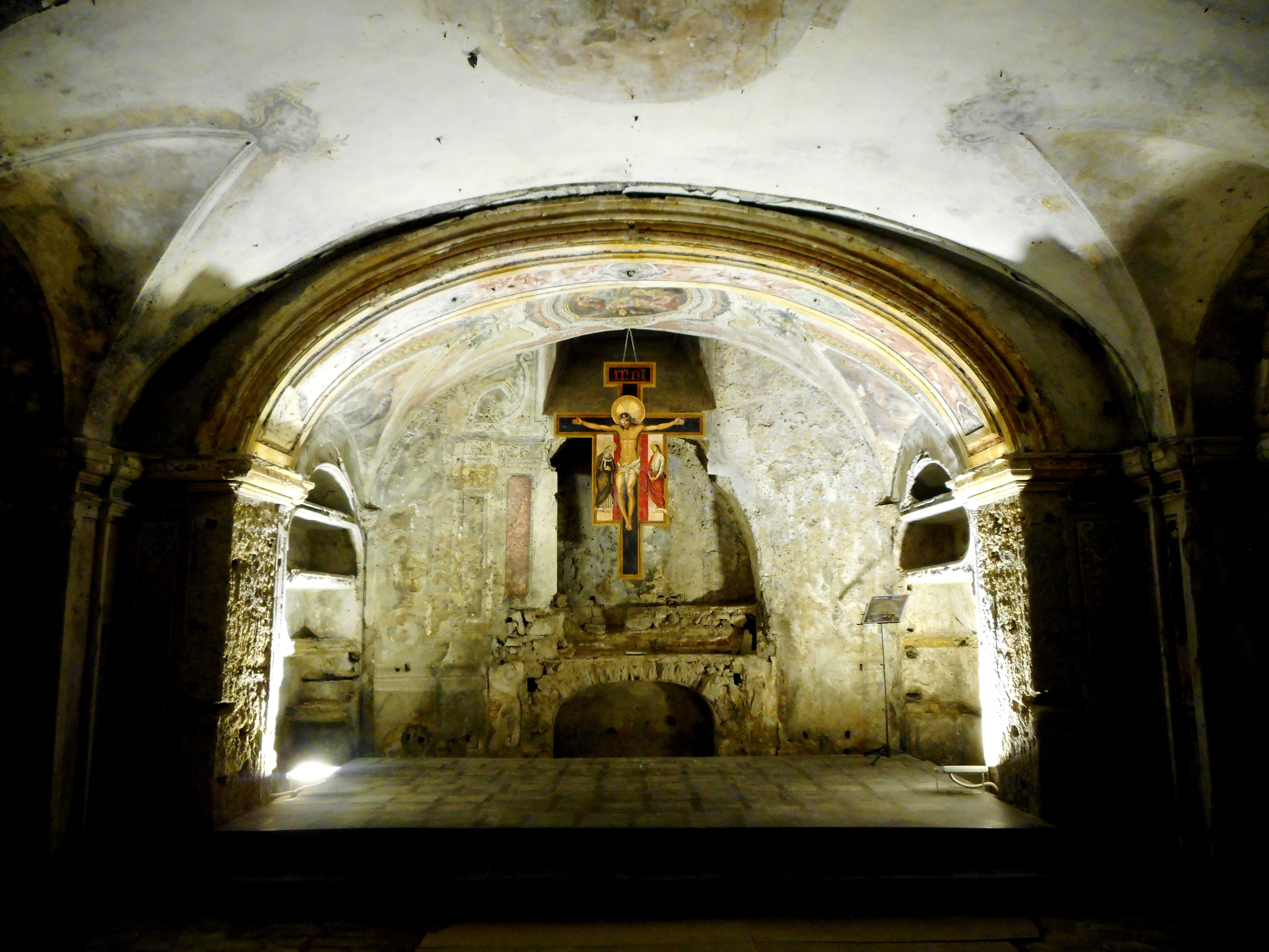 Cripta della chiesa di Santa Maria dell'Itria dei Cocchieri